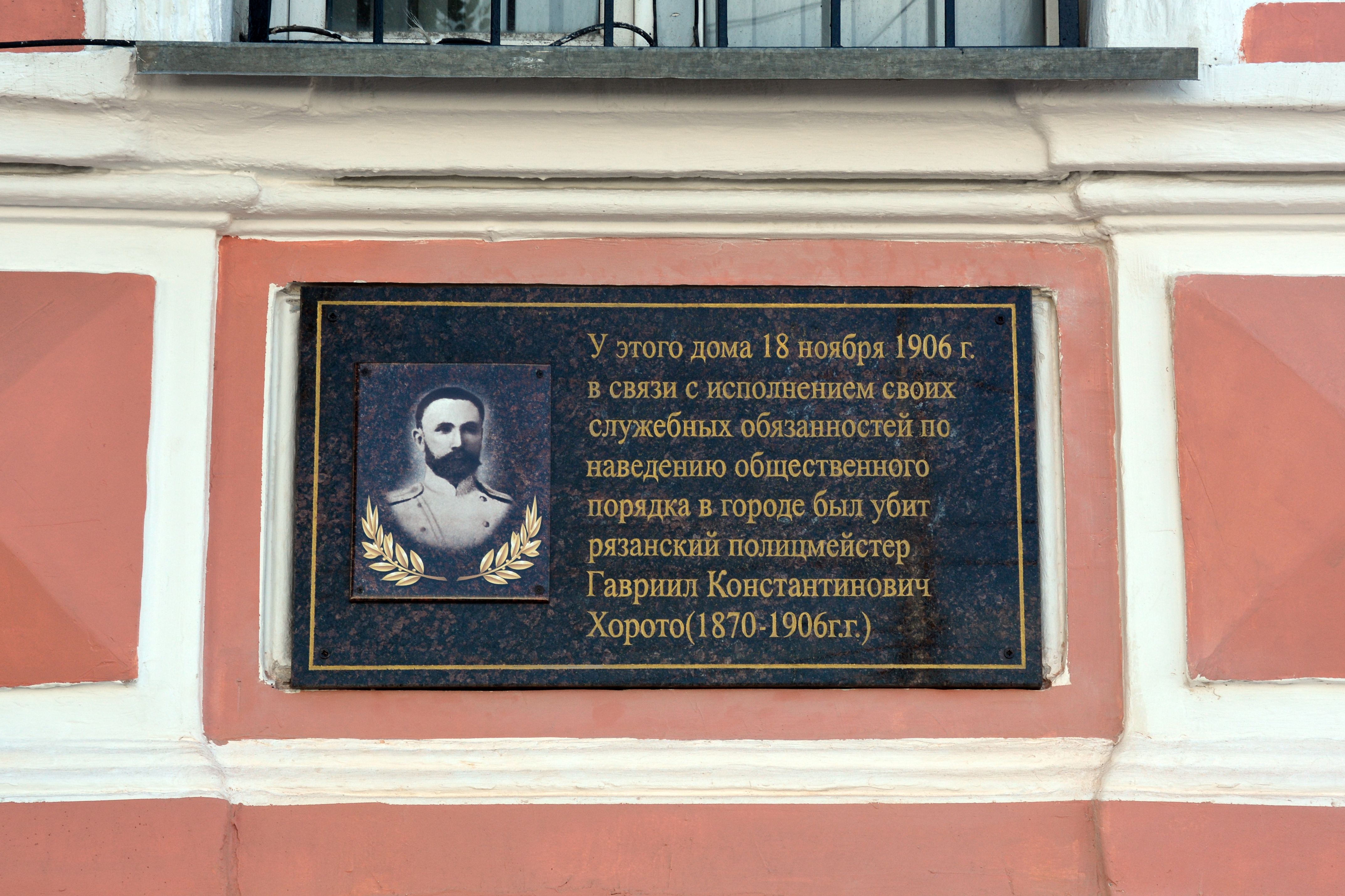 Памятная доска рязанскому полицмейстеру Г.К. Хорото на здании Октябрьского суда г. Рязани (бывшая гостиница Лапина), открытая 31 мая 2018 года